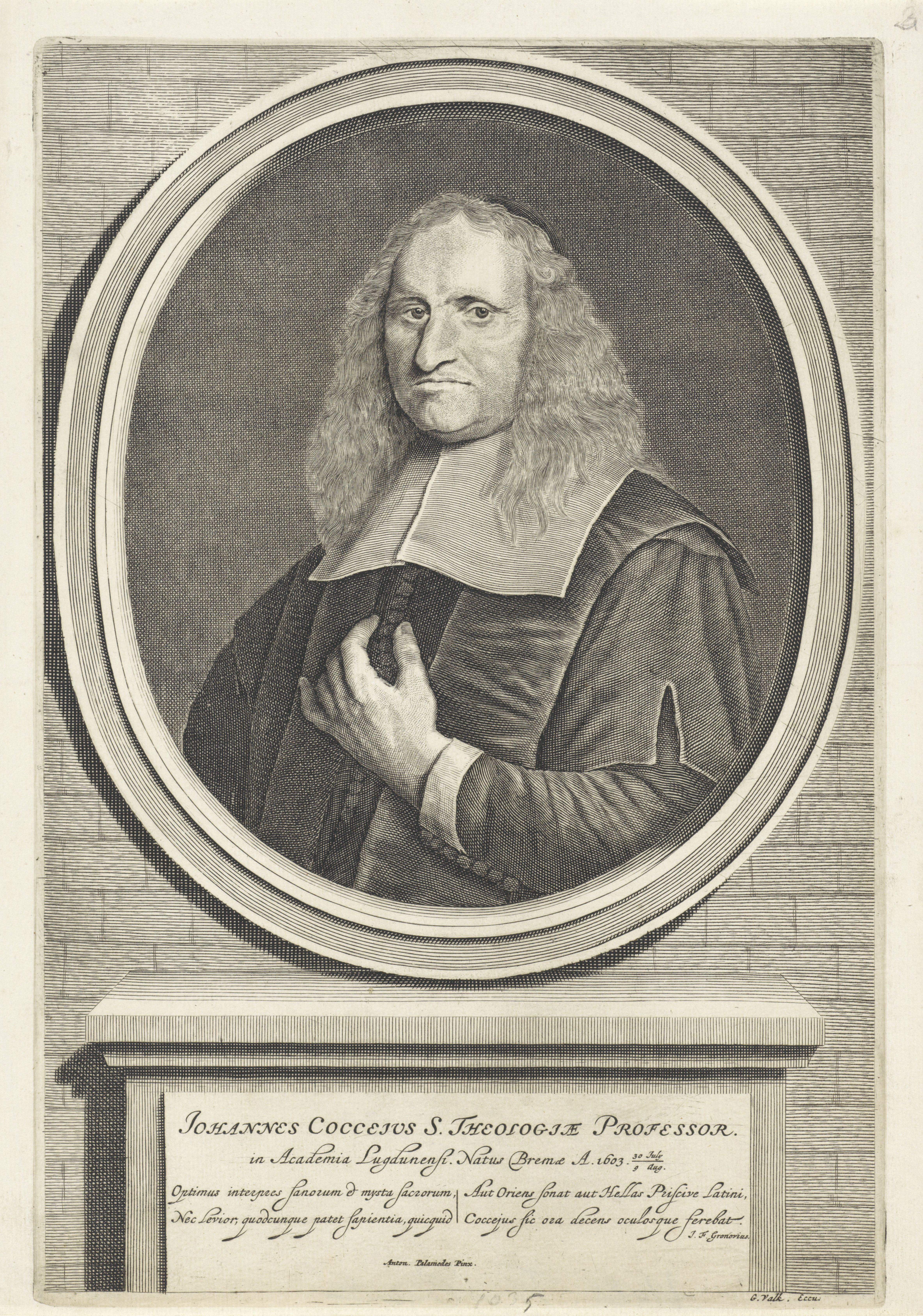 IdentificatieTitel(s): Portret van Johannes CocceiusObjecttype: prent Objectnummer: RP-P-1906-2851Catalogusreferentie: FMP 1072-gOpschriften / Merken: verzamelaarsmerk, verso midden, gestempeld: Lugt 2228Omschrijving: Portret van de theoloog Johannes Cocceius in een ovale omlijsting. Onder het portret enkele biografische gegevens en de functie van de geportretteerde. Daaronder een onderschrift in het Latijn.VervaardigingVervaardiger: prentmaker: anoniemnaar schilderij van: Anthonie Palamedesz. (vermeld op object)schrijver: Johann Friedrich Gronovius (vermeld op object)uitgever: Gerard Valck (vermeld op object)Plaats vervaardiging: prentmaker: Nederlandennaar schilderij van: Nederlandenuitgever: AmsterdamDatering: 1670 - 1726Fysieke kenmerken: ets en gravureMateriaal: papier Techniek: etsen / graveren (drukprocedé)Afmetingen: plaatrand: h 318 mm × b 213 mmOnderwerpWat: historical personsWie: Johannes CocceiusVerwerving en rechtenCredit line: Schenking van J.C. OvervoordeVerwerving: schenking 1906Copyright: Publiek domein